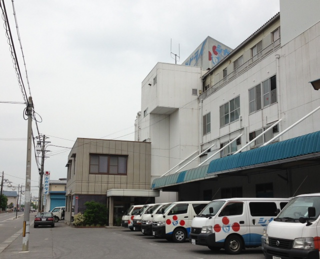 (株)シガドライウィザース本社工場